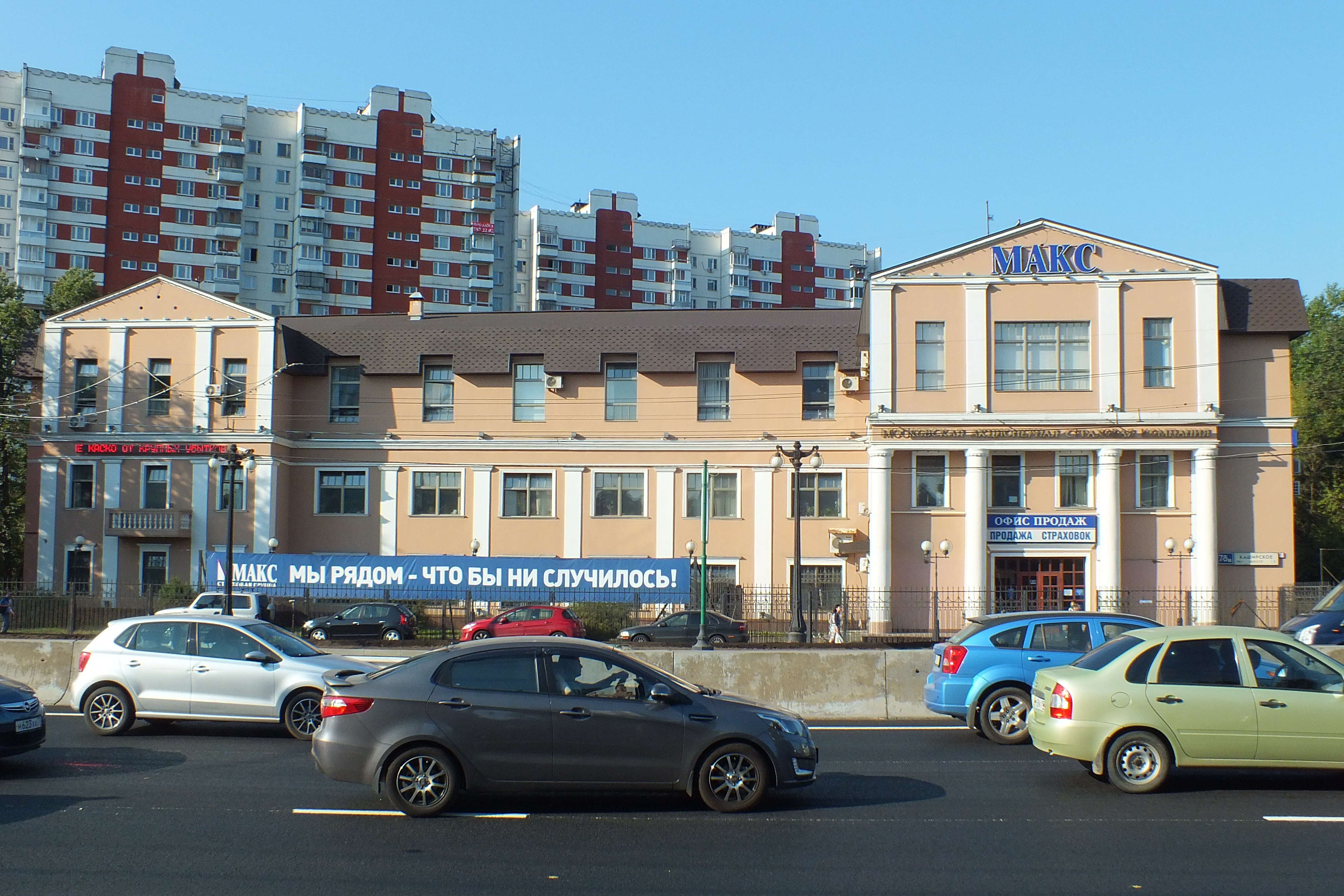 Офис страховой компании «МАКС» на Каширском шоссе в Москве. По данным викимапии - дом культуры 1936 года с надстроенным третьим этажом